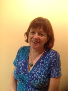 Anna ag Oireachtas na Gaeilge 2015